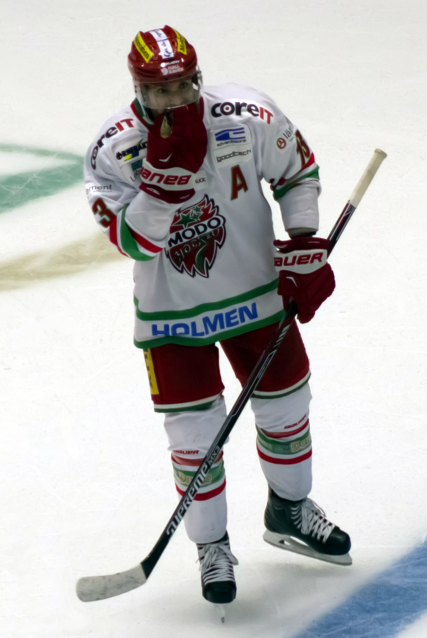 Bill Thomas, xogador do MODO Hockey, nun partido contra o Färjestads BK no Löfbergs Arena de Karlstad.